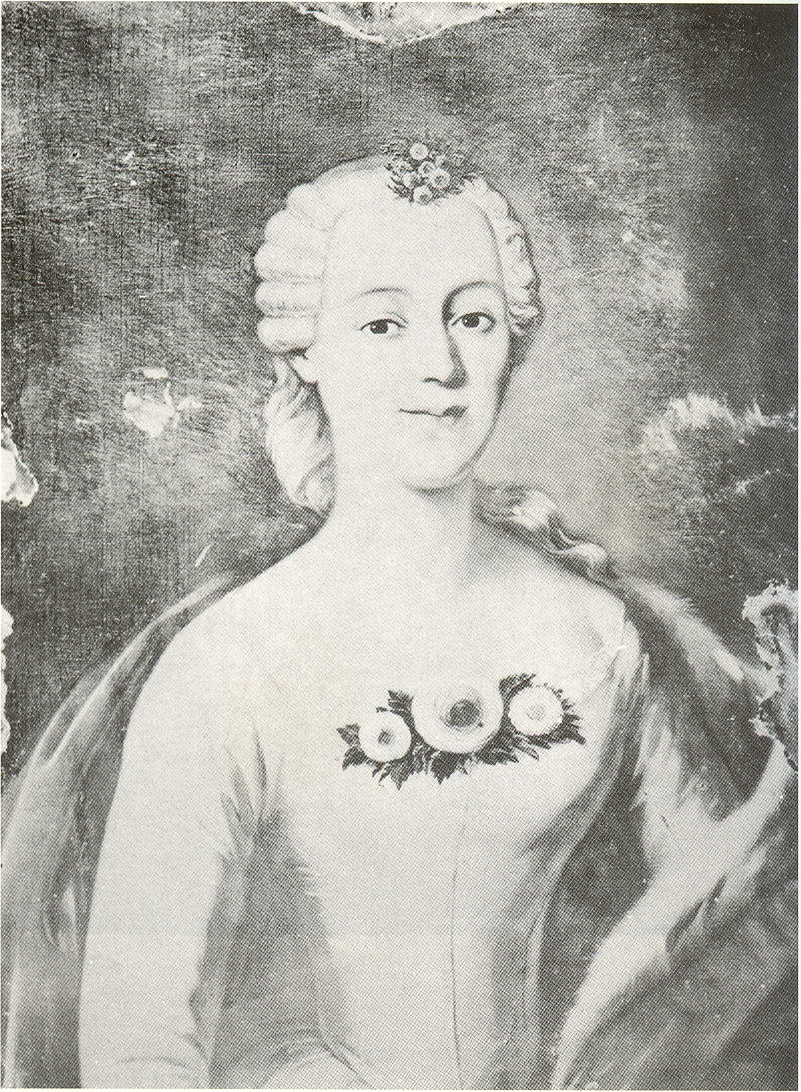 Беларуская (тарашкевіца): Партрэт Мар’яны Касакоўскай (Marjana Kasakoŭskaja) з роду Забелаў (Zabieła)